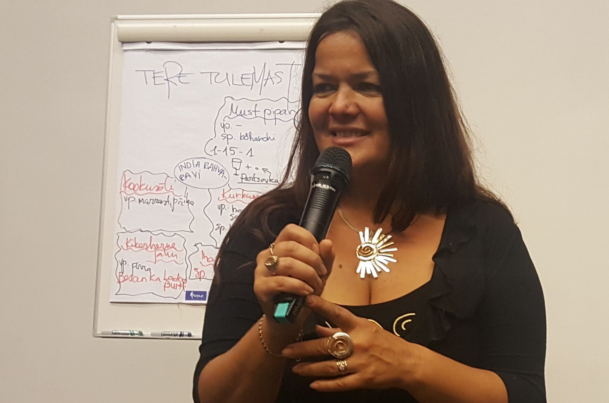 JCI ITF taseme koolitaja Katrin Aedma esinemas Vikingite Külas, Eestis